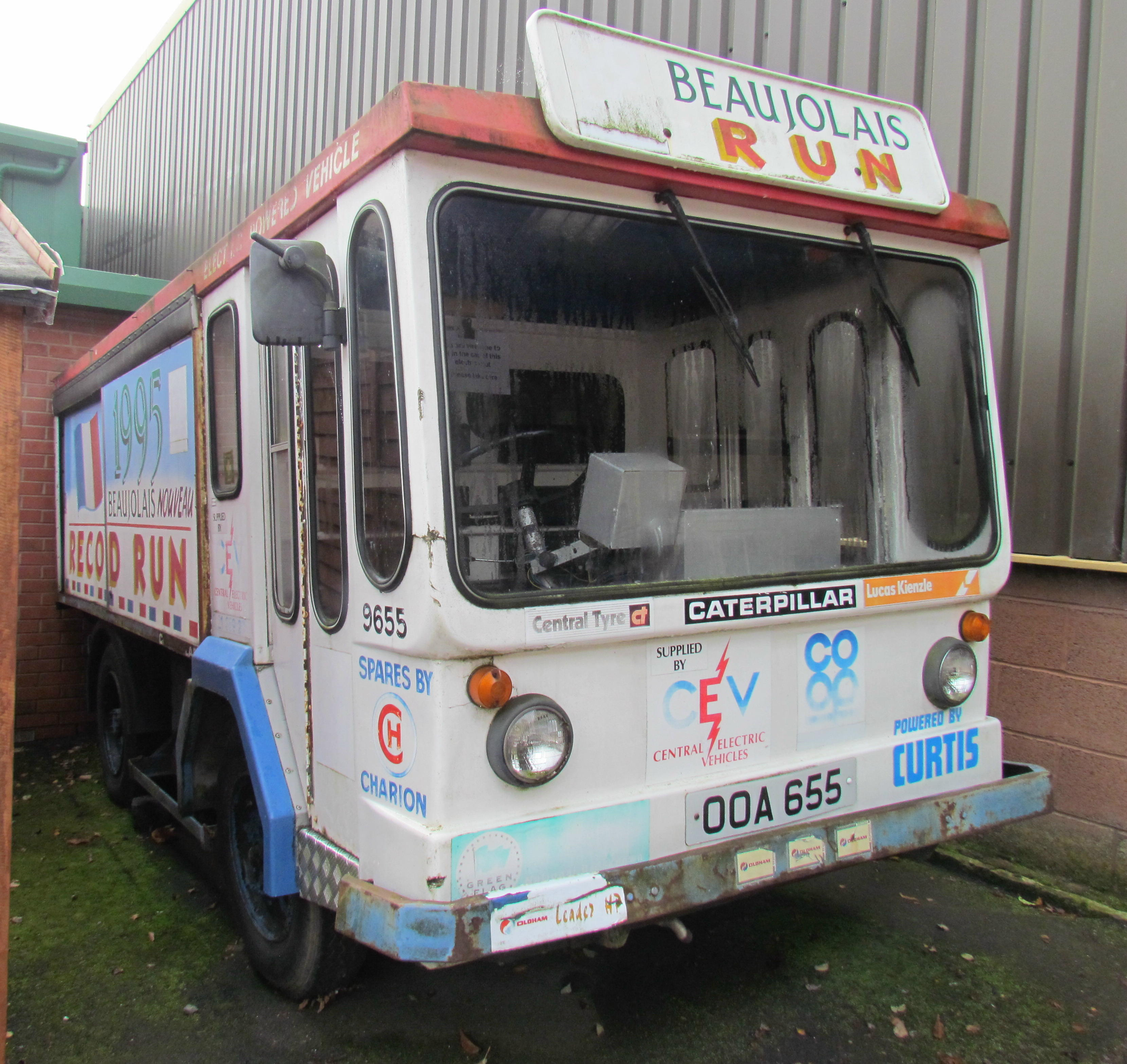 1954 - Morrison Electricar - OOA 655